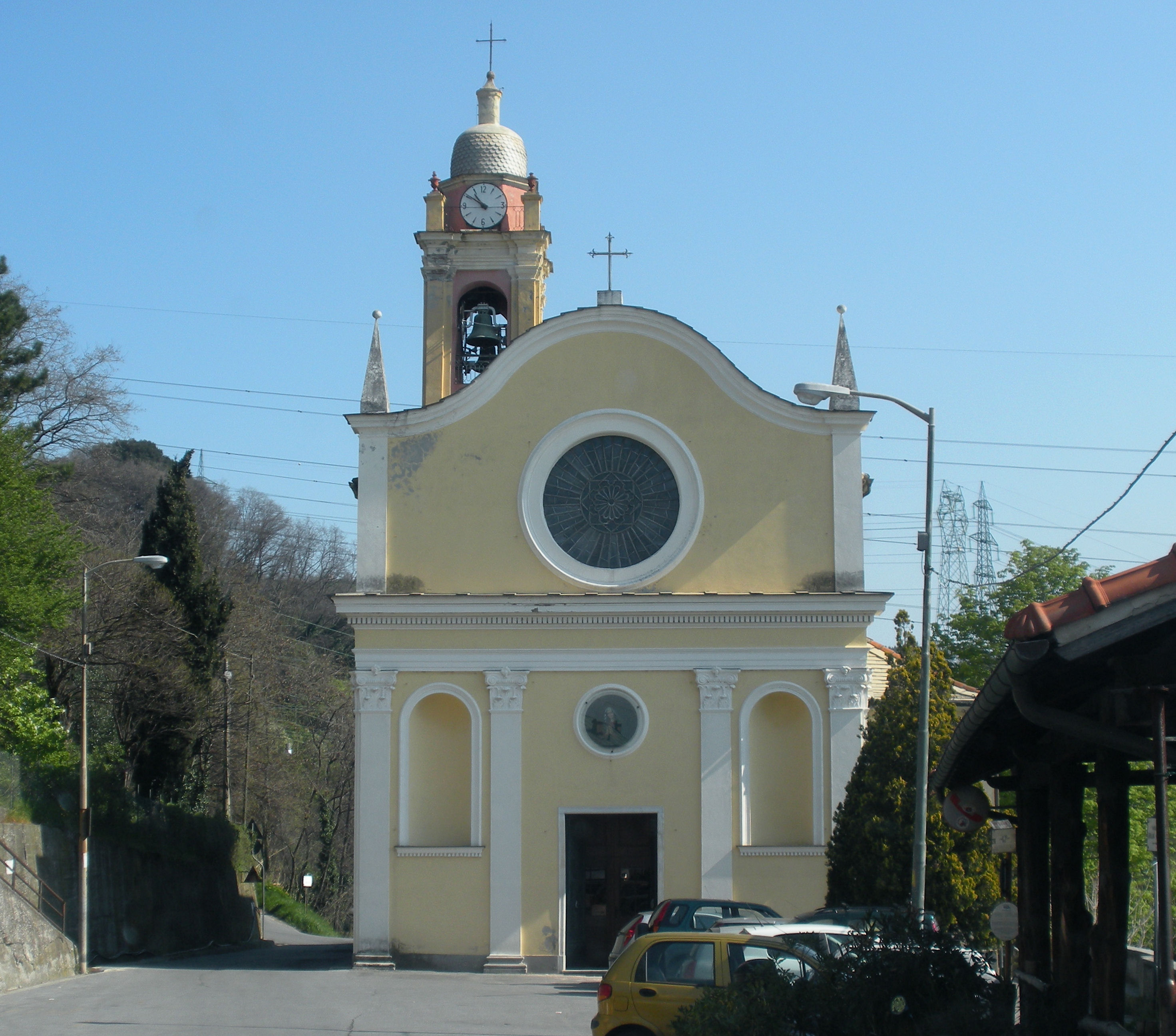 Chiesa di S. Andrea di Morego (Bolzaneto, Genova) Foto propria Aprile 2010